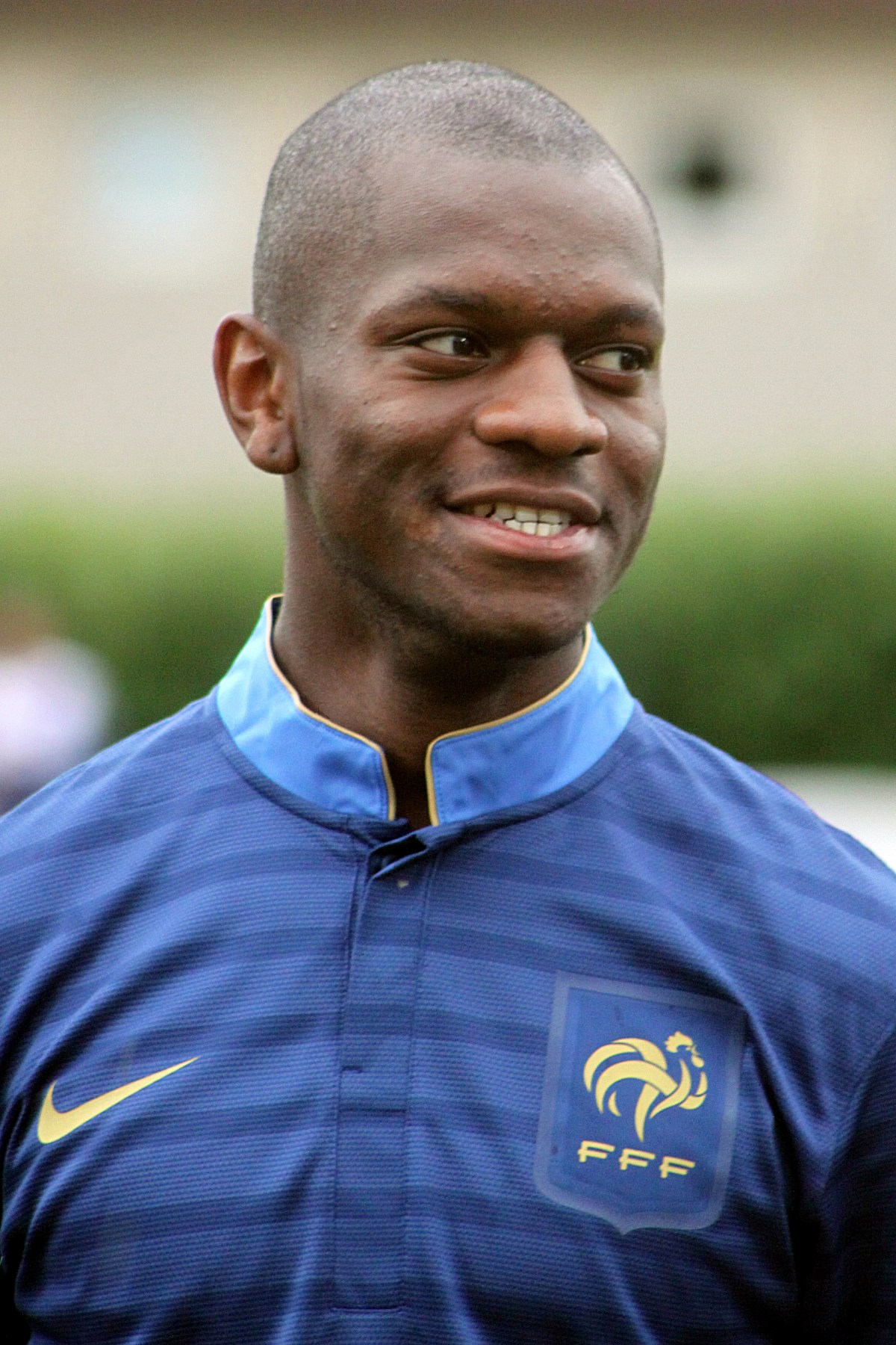 Qualifikationsspiel zur U-19 Fußball-Europameisterschaft: Österreich] gegen Frankreich am 10. Juni 2013 (0:1)] in Traiskirchen. - Das Foto zeigt Jordan Ikoko (Paris Saint-Germain FC). en Qualification for the 2013 UEFA European Under-19 Football Championship qualification Austria vs. France (0:1) on 2013-2013-06-10 in Traiskirchen. – The photo shows Jordan Ikoko (Paris Saint-Germain FC).